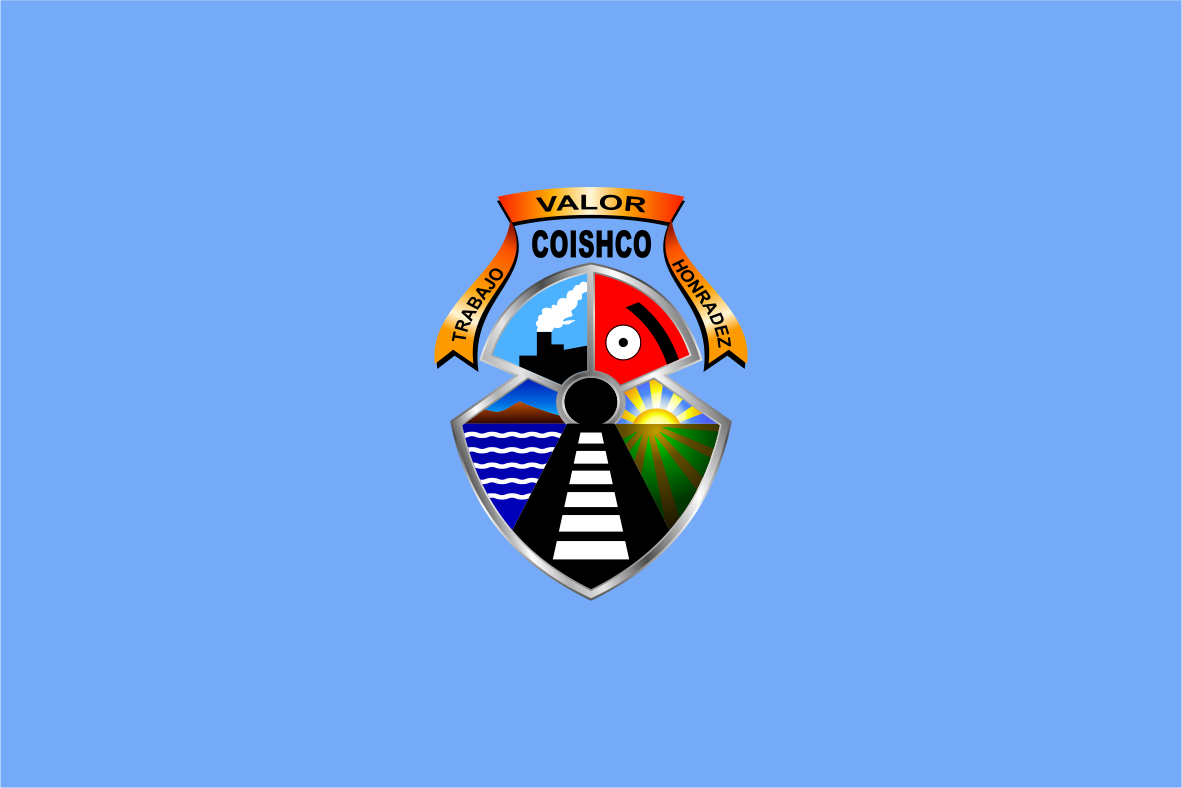 Distrito de Coishco - Provincia del Santa - Región Ancash